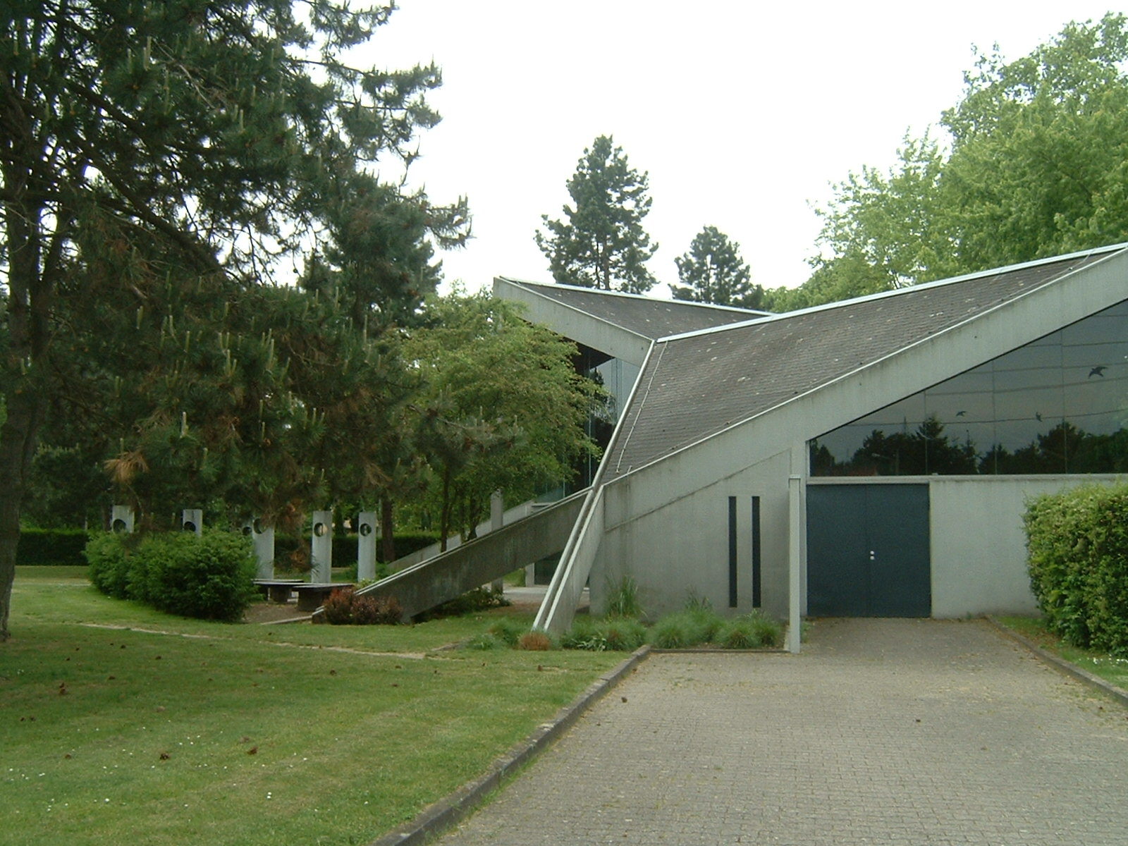 Trauerhalle am Friedhof in Okriftel/Hattersheim am Main